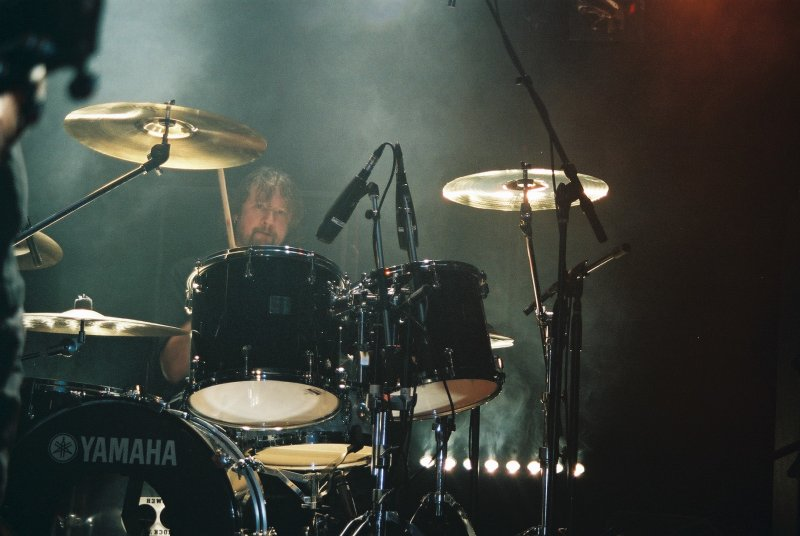 New Model Army en concert au Big Band Café, Caen/Hérouville Saint-Clair